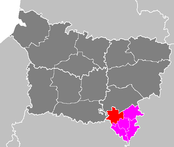 Carte du canton de Neuilly-Saint-Front